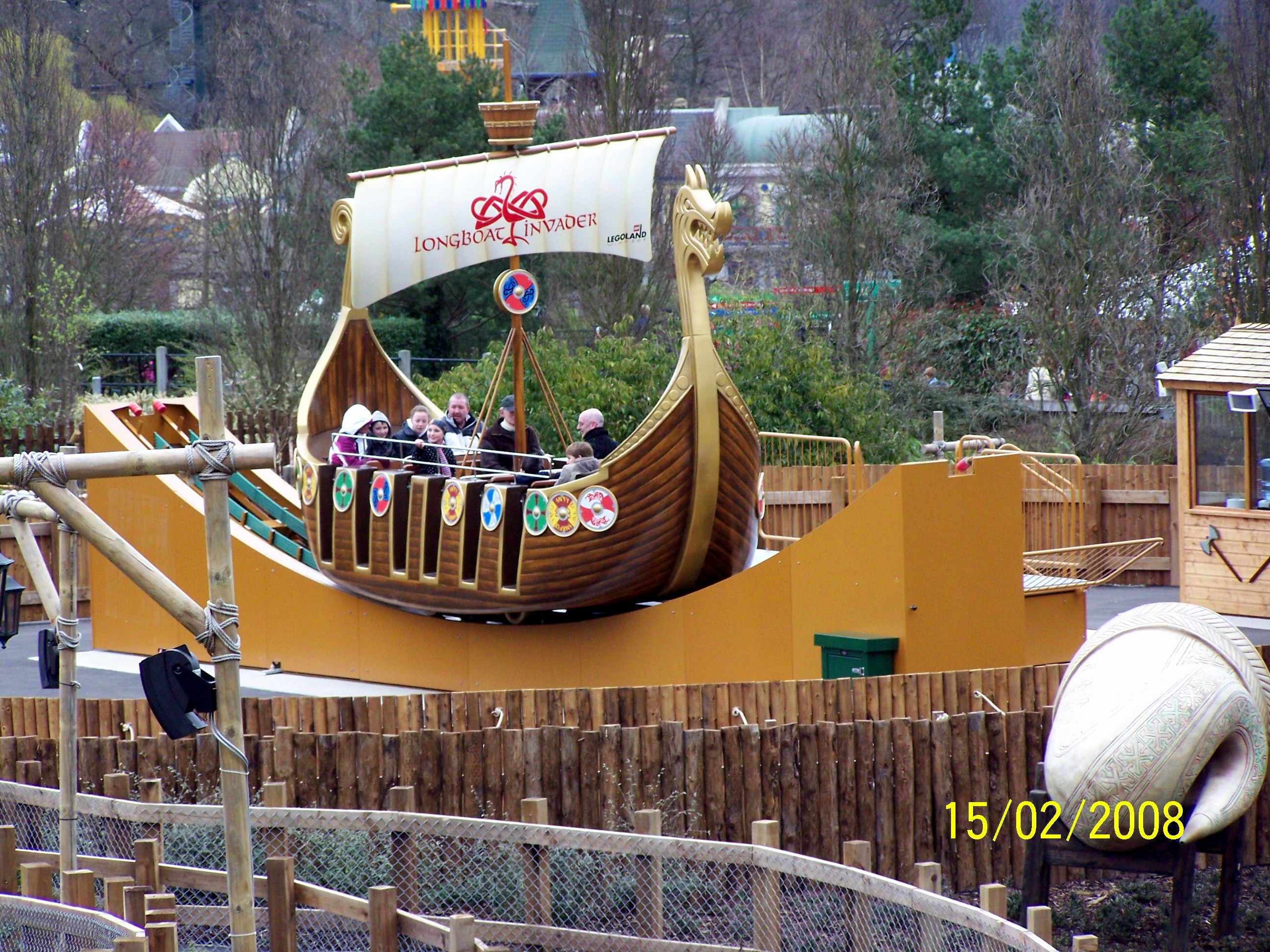 LEGOLAND Windsor, Berkshire, Inglaterra: brinquedo "Longboat Invader" do tema LEGO Vikings.